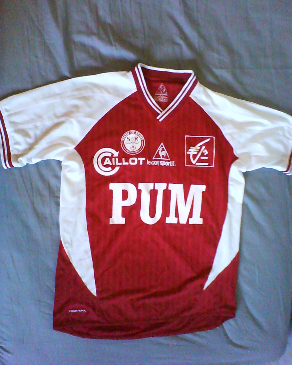 Maillot home du Stade de Reims de la saison 2003-2004